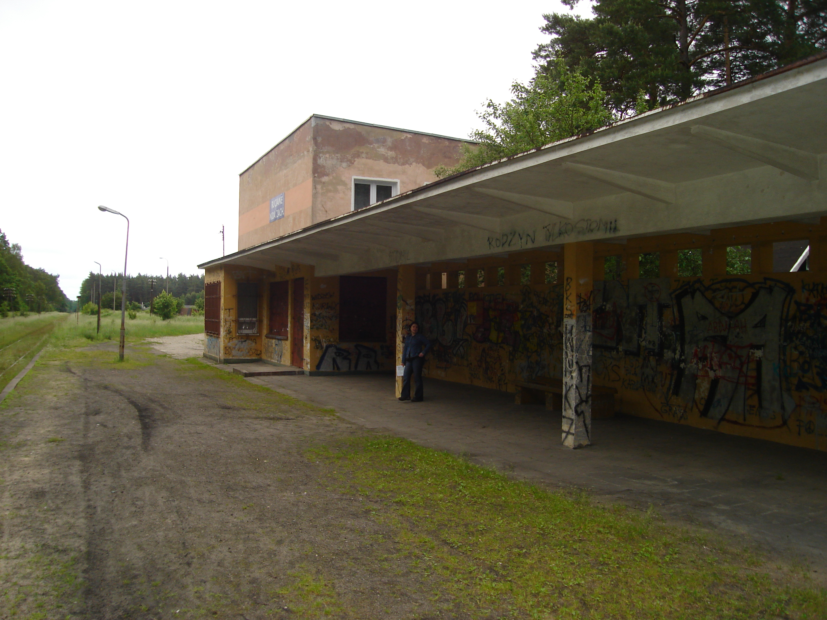 Stacja kolejowa "Ruciane-Nida Zachód"